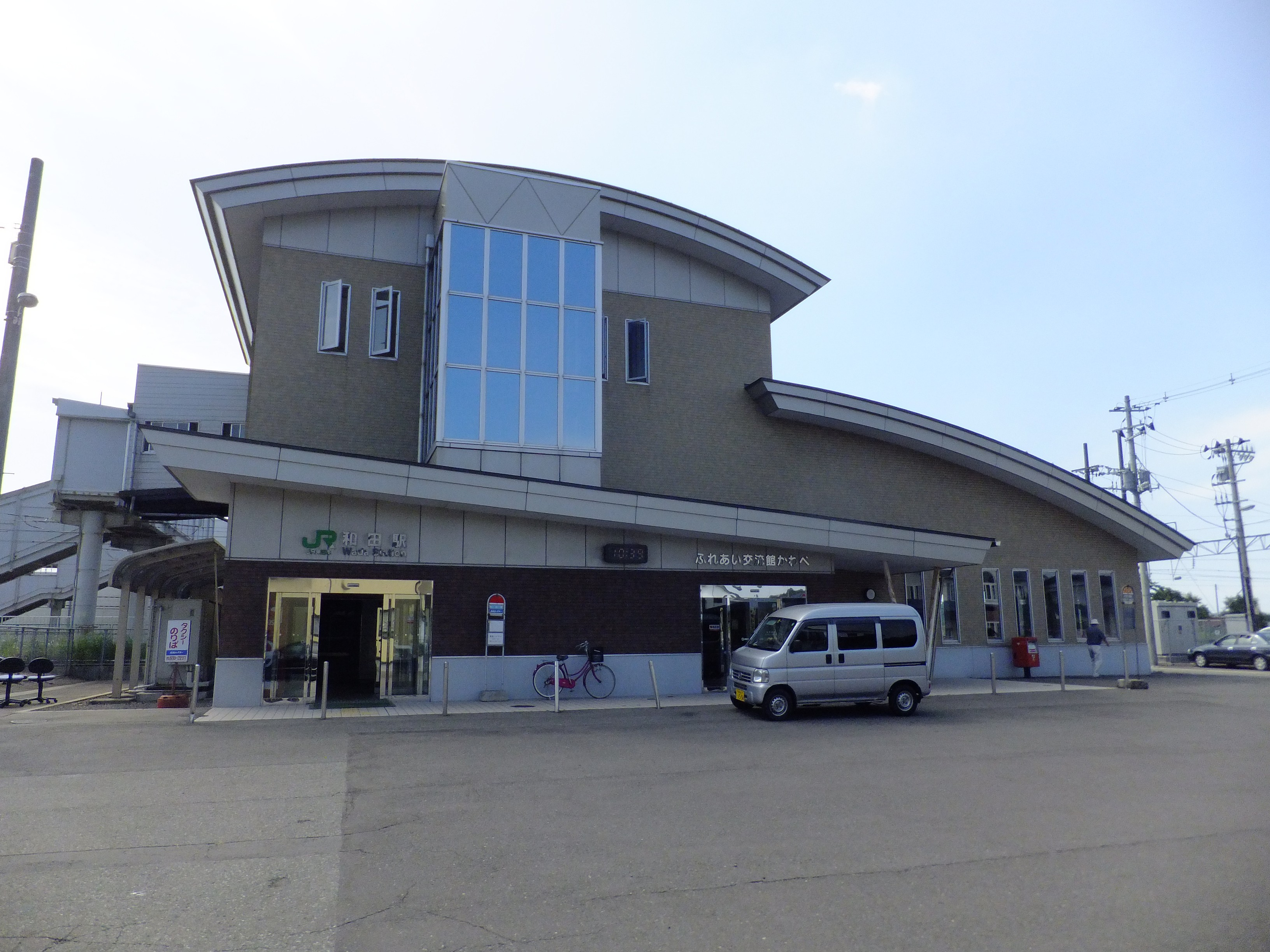 奥羽本線和田駅、北口。1階には河辺地区交流センターがある。